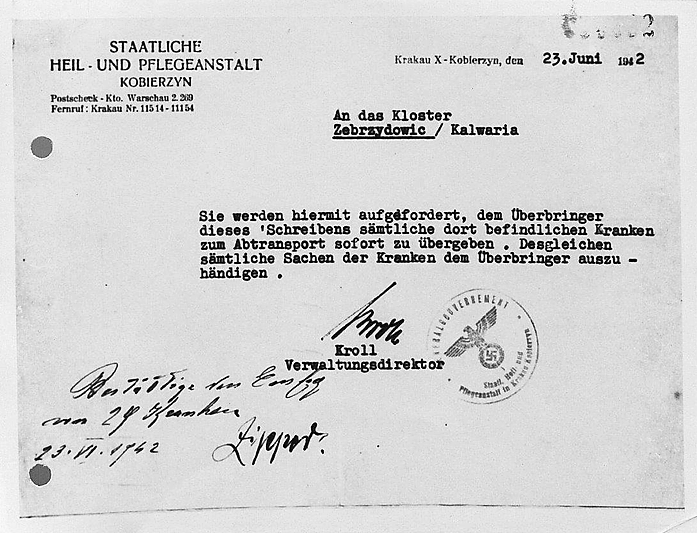 Dokument wystawiony 23 czerwca 1942 przez niemieckiego dyrektora Zakładu dla Umysłowo i Nerwowo Chorych w Kobierzynie, Alexa Krolla z żądaniem wydania 30 chorych ze szpitala klasztoru oo. Bonifratrów w Zebrzydowicach